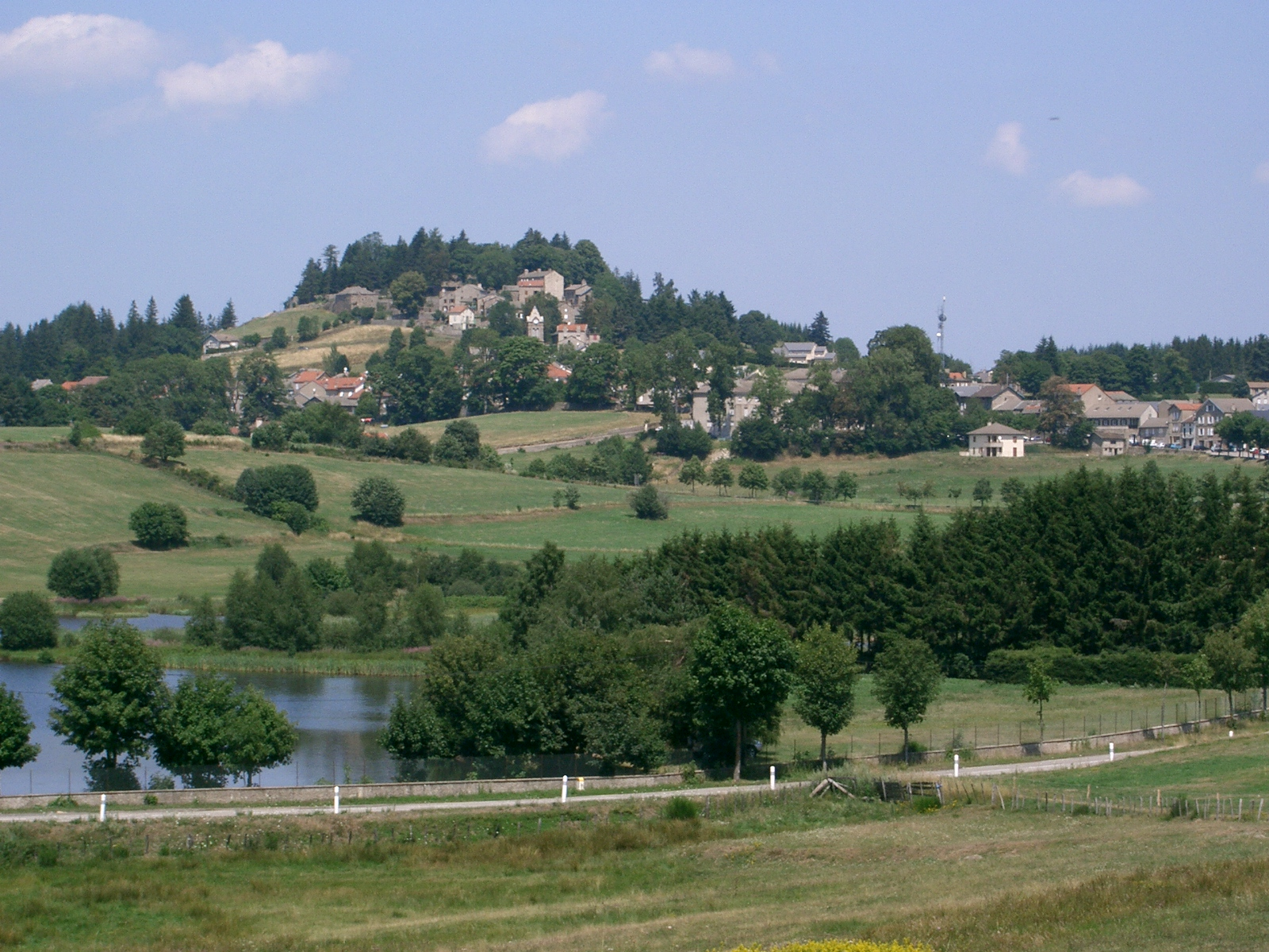 Saint Agrève et le mont Chiniac - Ardèche - France self made PRA